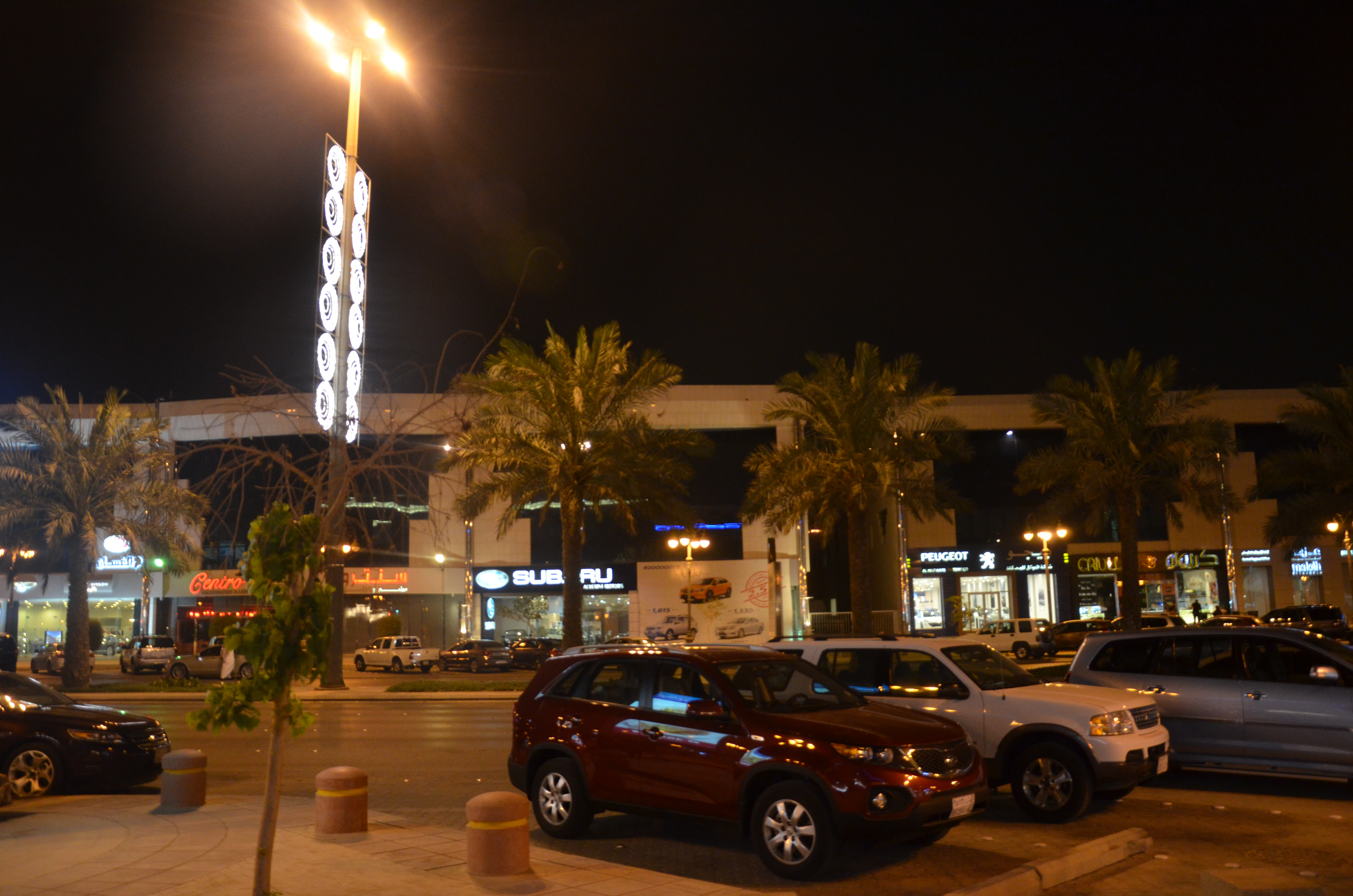 شارع التحلية) شارع الأمير محمد بن عبد العزيز) الرياض